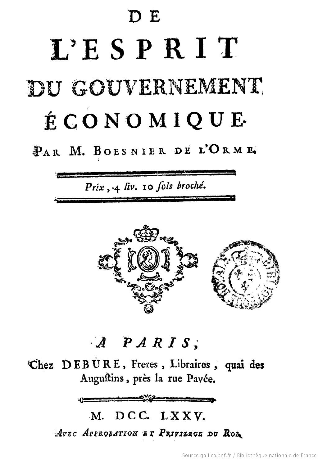 De l'Esprit du Gouvernement économique (de Paul Boesnier de l'Orme)